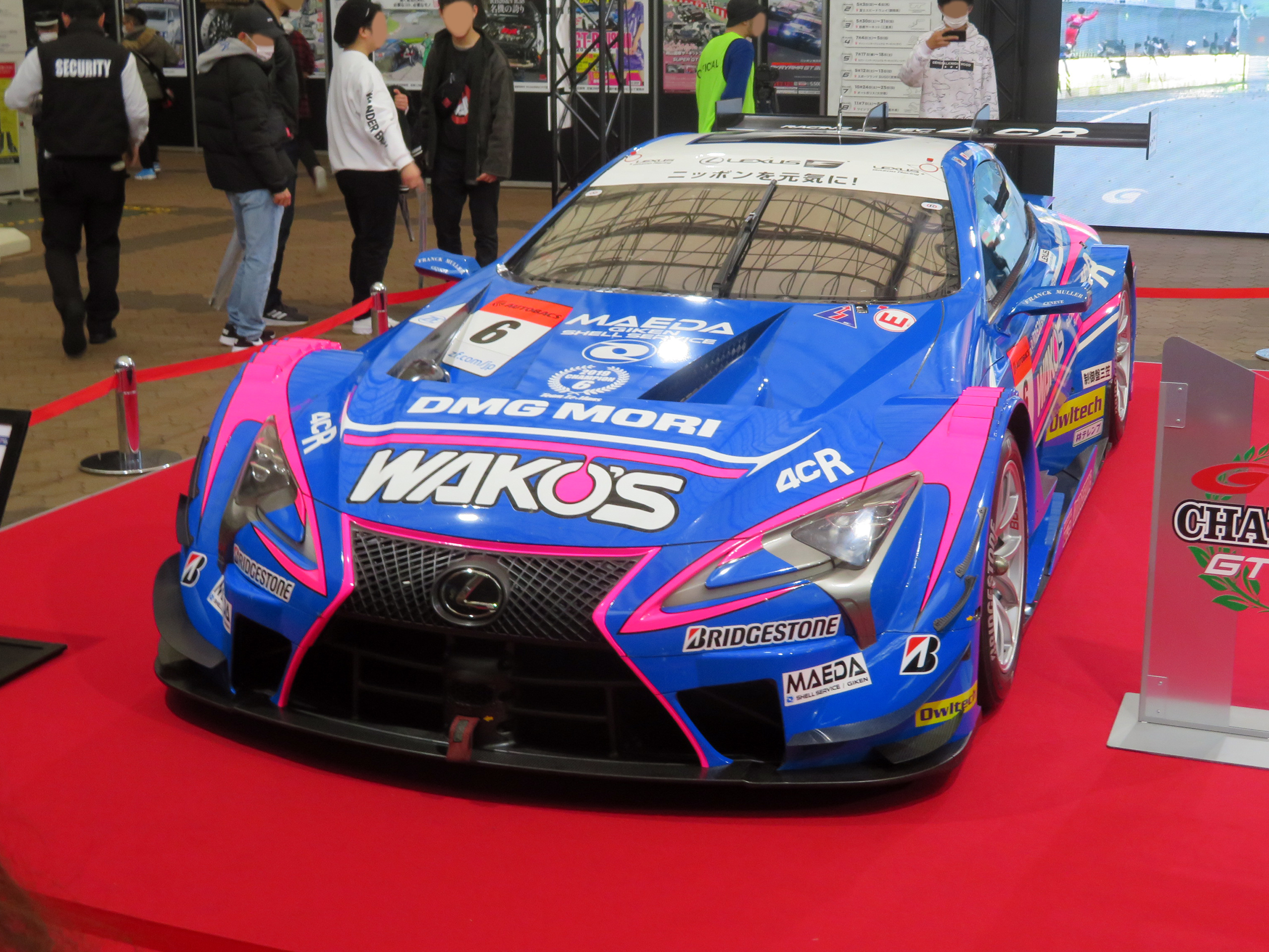 大阪オートメッセ2020に於いて6号車WAKO'S 4CR LC500の2019年仕様を撮影。